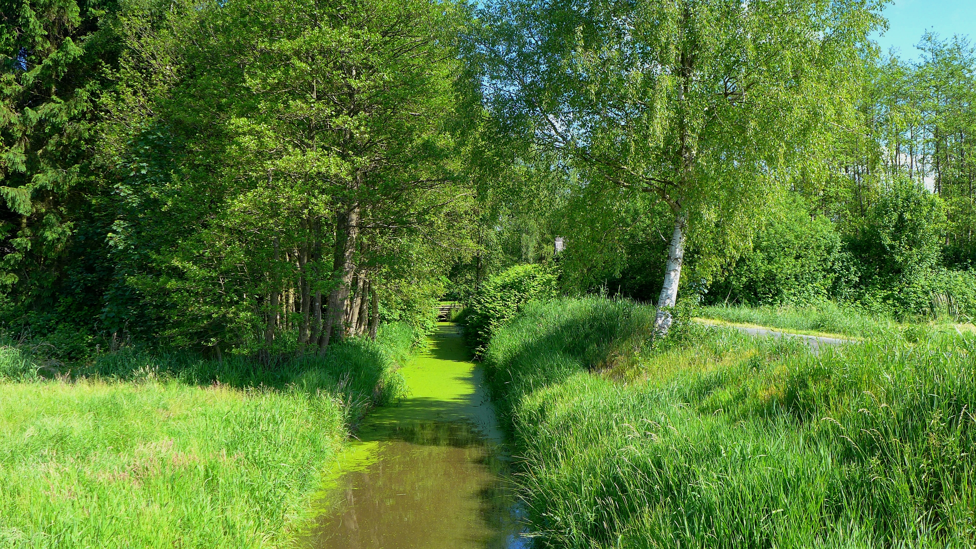 Der 2. Kanal von vier Kanälen im Neulandermoor. Aufnahmedatum 2015-06.